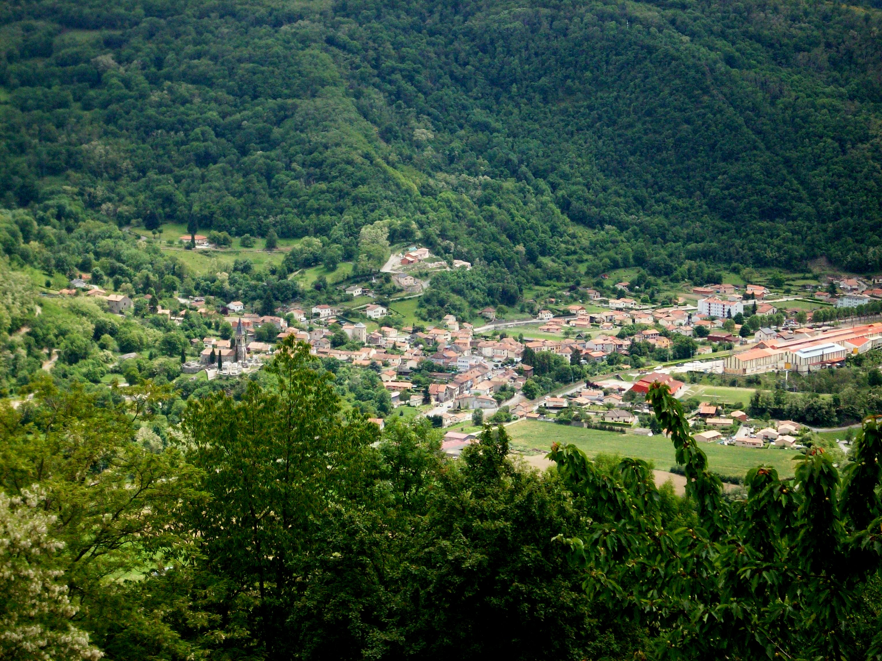 Vue de Mercus depuis le belvédère de Seignaux